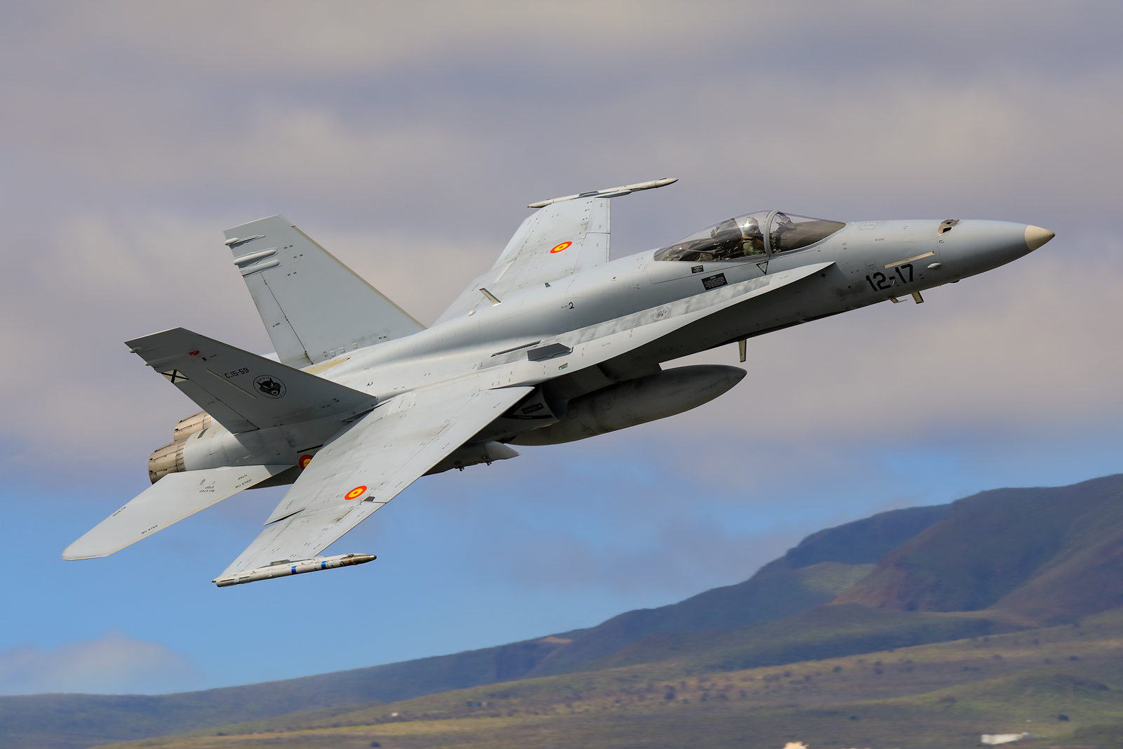 Foto cedida por Raimundo Pérez Cabrera